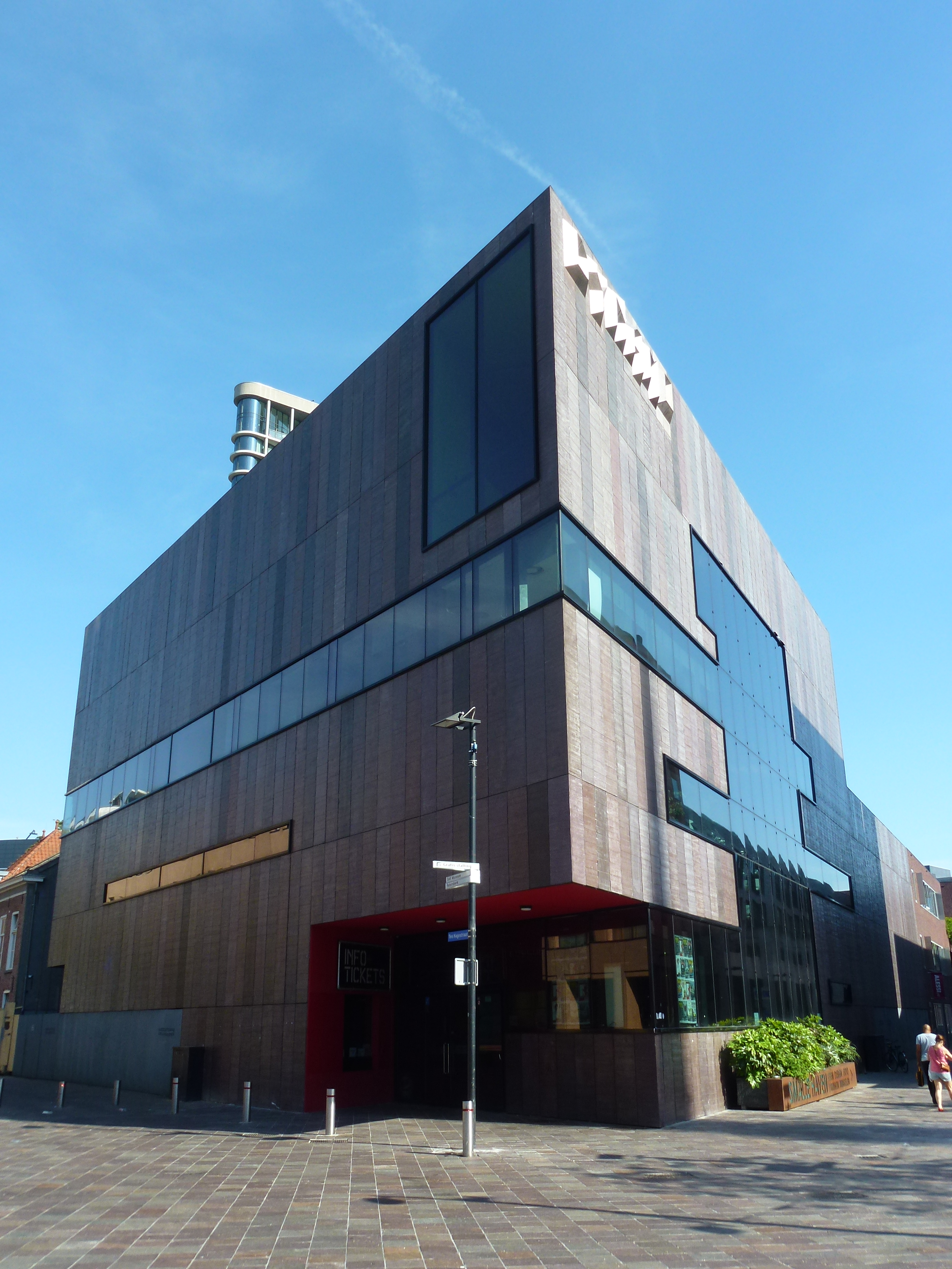 jongerencentrum Dynamo Eindhoven